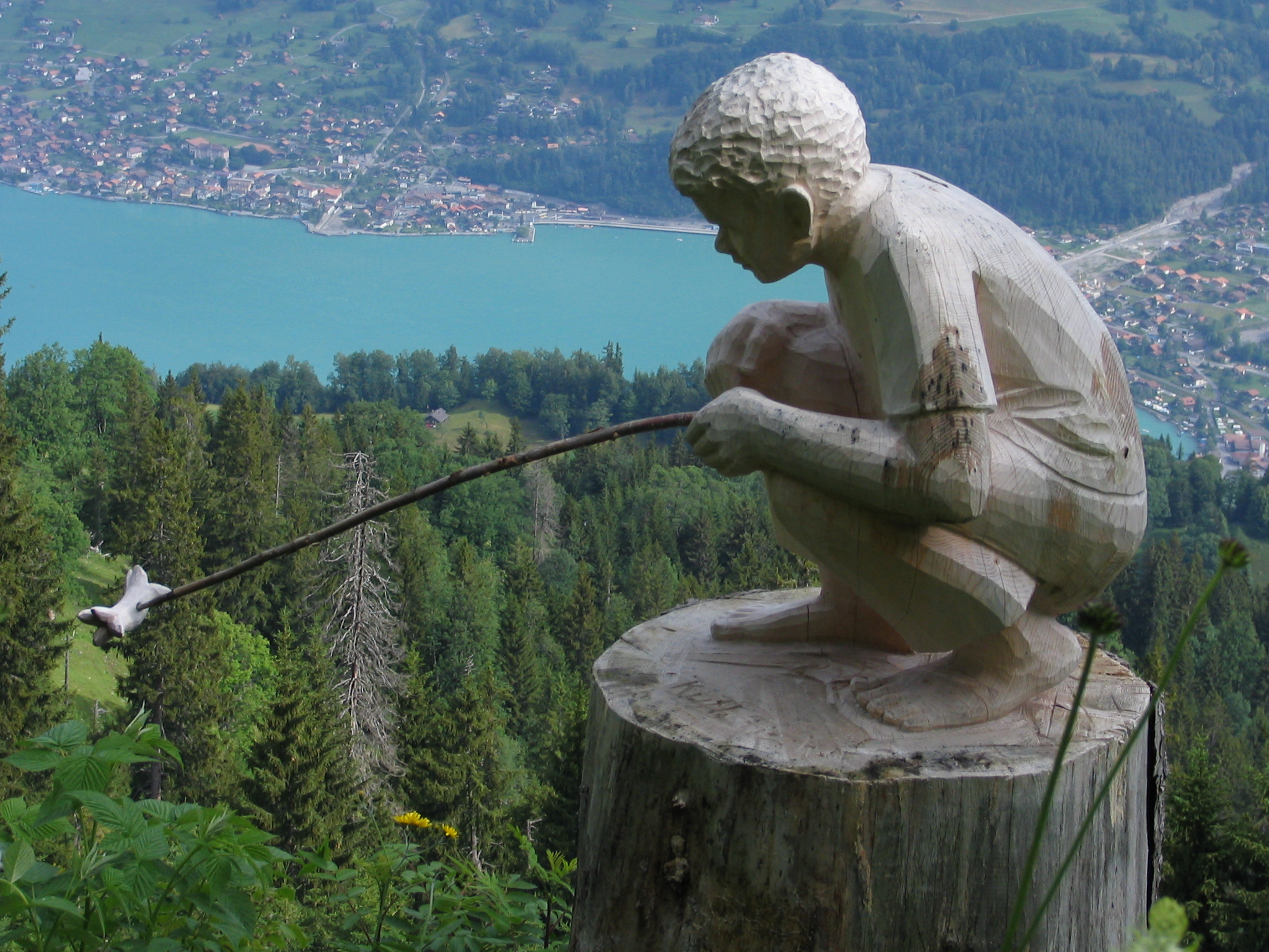 Geschnitzte Figur eines Knaben am Schnitzlerweg auf der Axalp. Im Hintergrund Brienz (Kanton Bern, Schweiz). Schnitzerei: Werk von Ruth Fischer, 2004. Information von